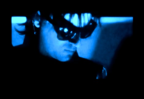 Nigel Degray (während einer Videoaufnahme 1989)